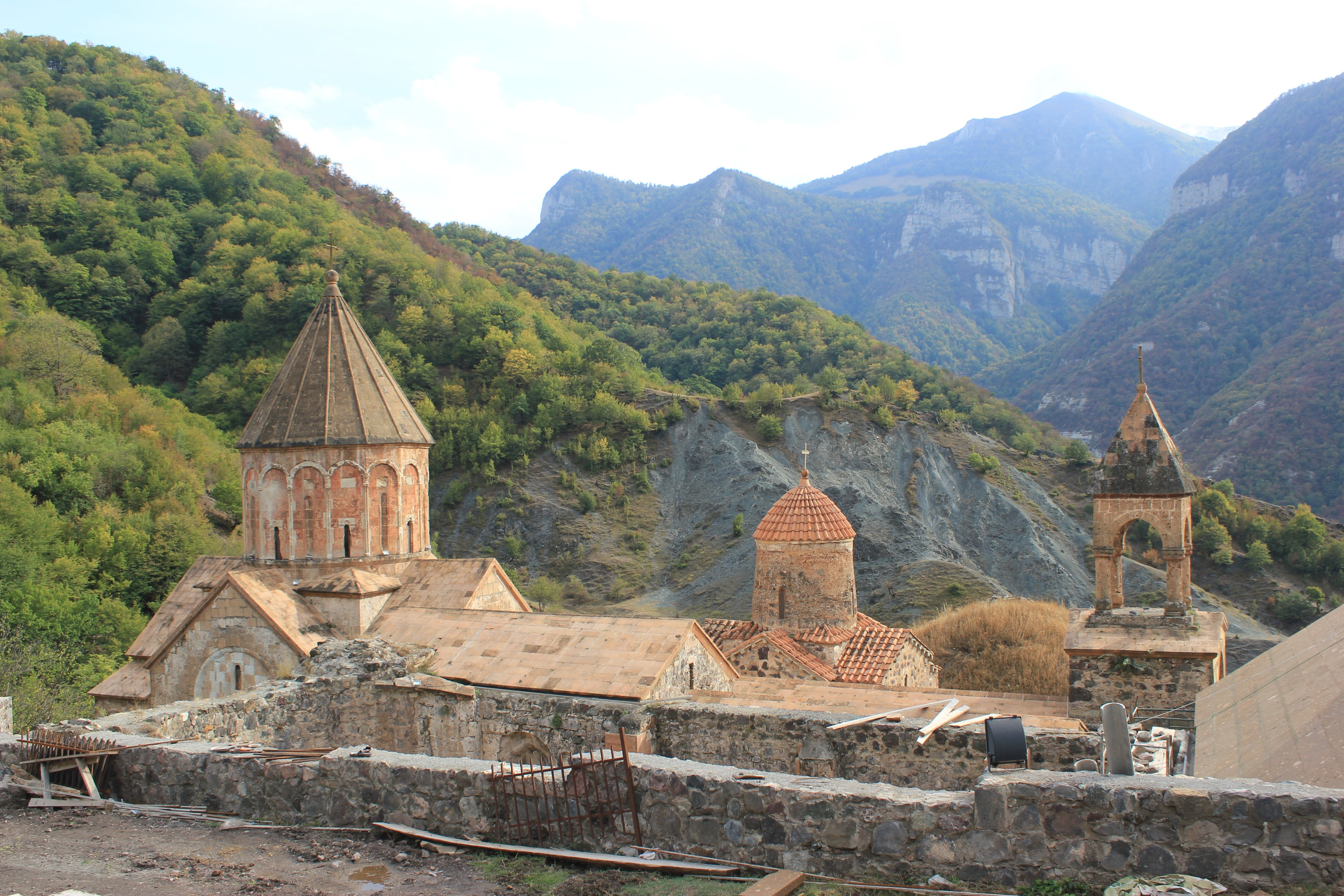 Hornjoserbsce: Klóšter Dadiwank pola Kalbadźara (Azerbajdźan/Nahórski Karabach).